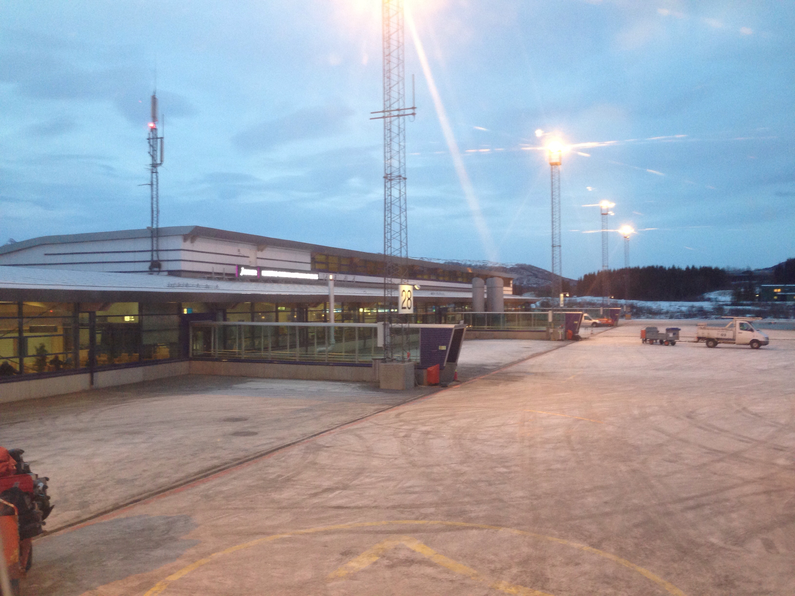 Harstad, Troms fylke, Nord Norge